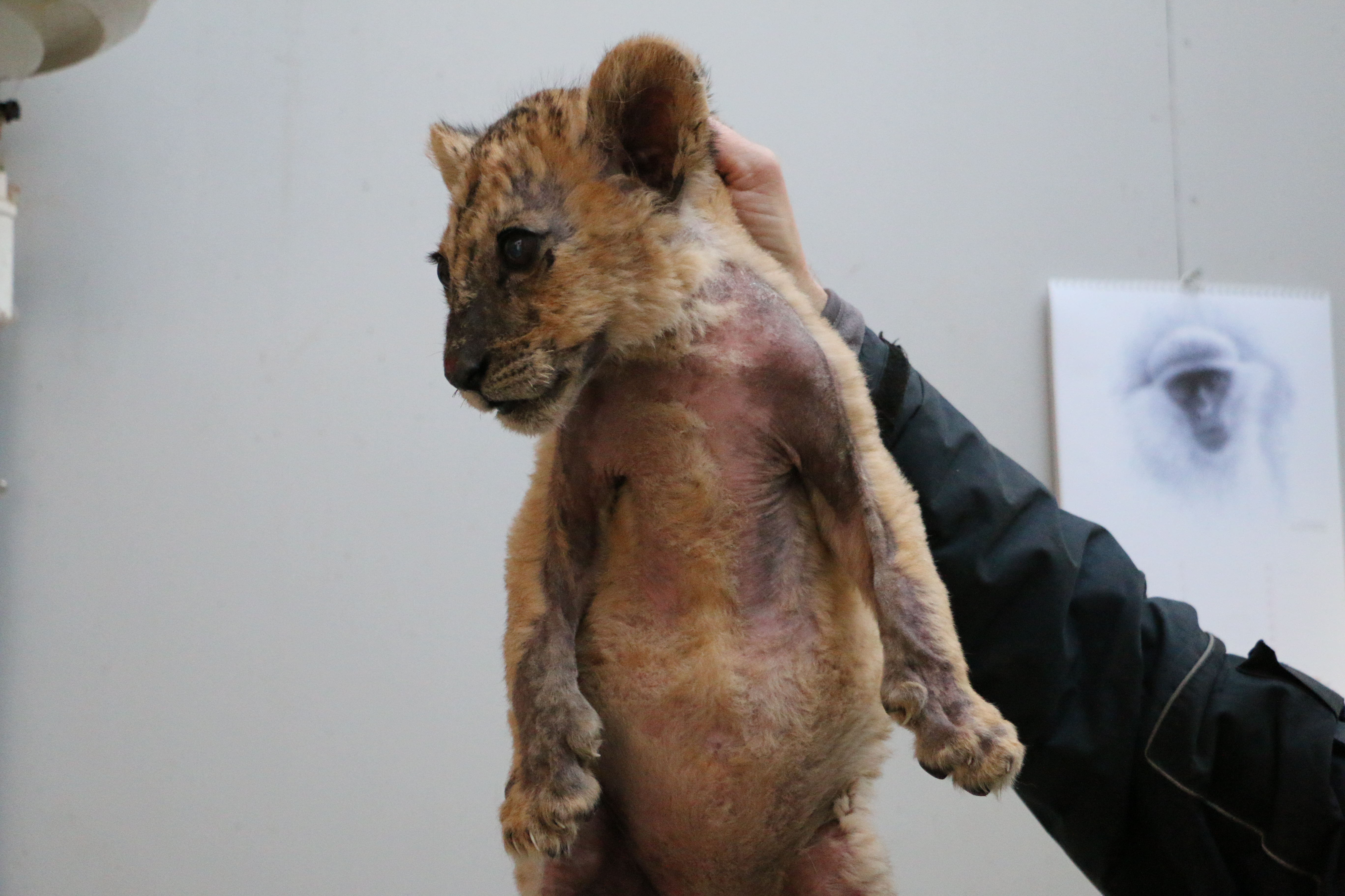 La lionne déposée à Amnéville arrivant à l'Espace Zoologique de Saint Martin la Plaine. Constatation de ses graves carences : pelage clairsemé, ventre gonflé, glaucome à l'oeil gauche...